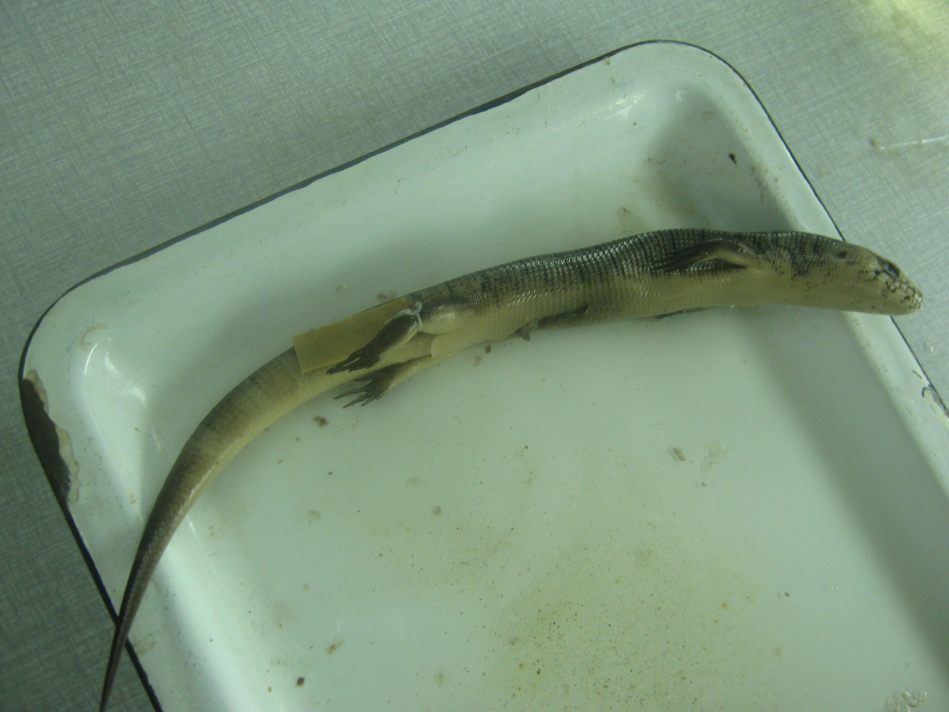 Ejemplar de Diploglossus monotropis